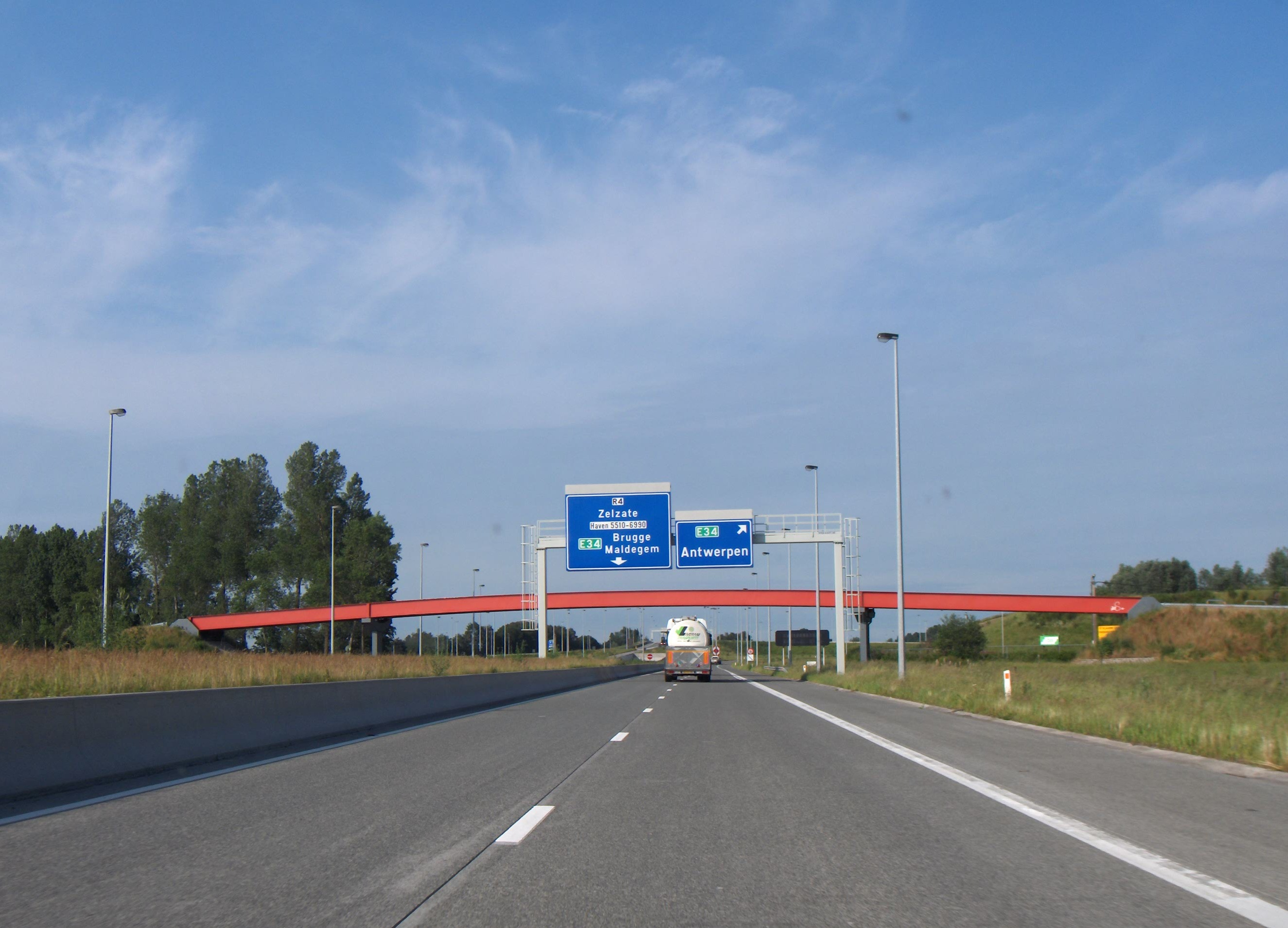 R4 (Ringautobahn um Gent, Belgien), Verknüpfung mit der Autobahn E34 in der Nähe von Zelzate-West (Autobahnkreuz "Callemansputte"). 2004 vollendet. Im Hintergrund (rot) Radfahrer- und Fußgängerbrücke.